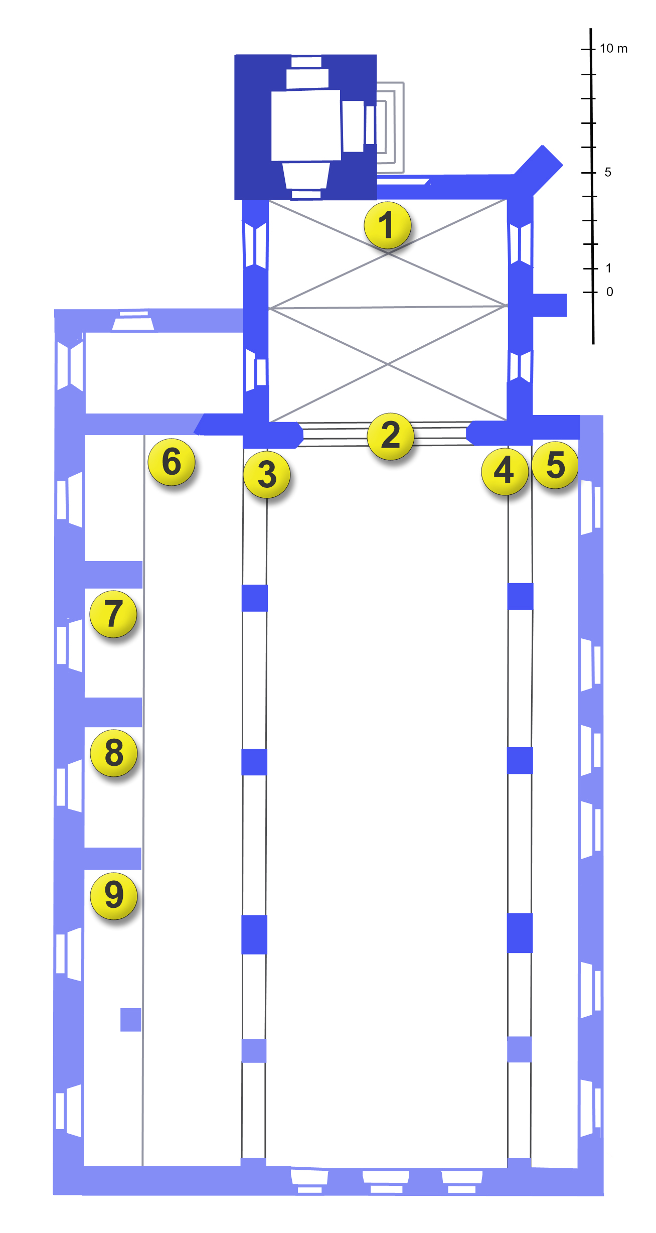 Grundriss der 1910 abgerissenen, alten Stadtkirche in Tauberbischofsheim und Aufstellung der 1664 aufgelisteten Altäre: (1) Hochaltar Hl. Martin, (2) Schleieraltar Hl. Stephan, (3) Hl. Katharina, (4) Hl. Maria, (5) Hll. Andreas und Nikolaus, (6) Hll. Petrus und Paulus, (7) Hl. Anna, (8) Kreuzaltar, (9) Hl. Margaretha. (Angaben nach: Jessica Mack-Andrick: Von beiden Seiten betrachtet – Überlegungen zum Tauberbischofsheimer Altar. In: Grünewald und seine Zeit, München 2007, S. 70)